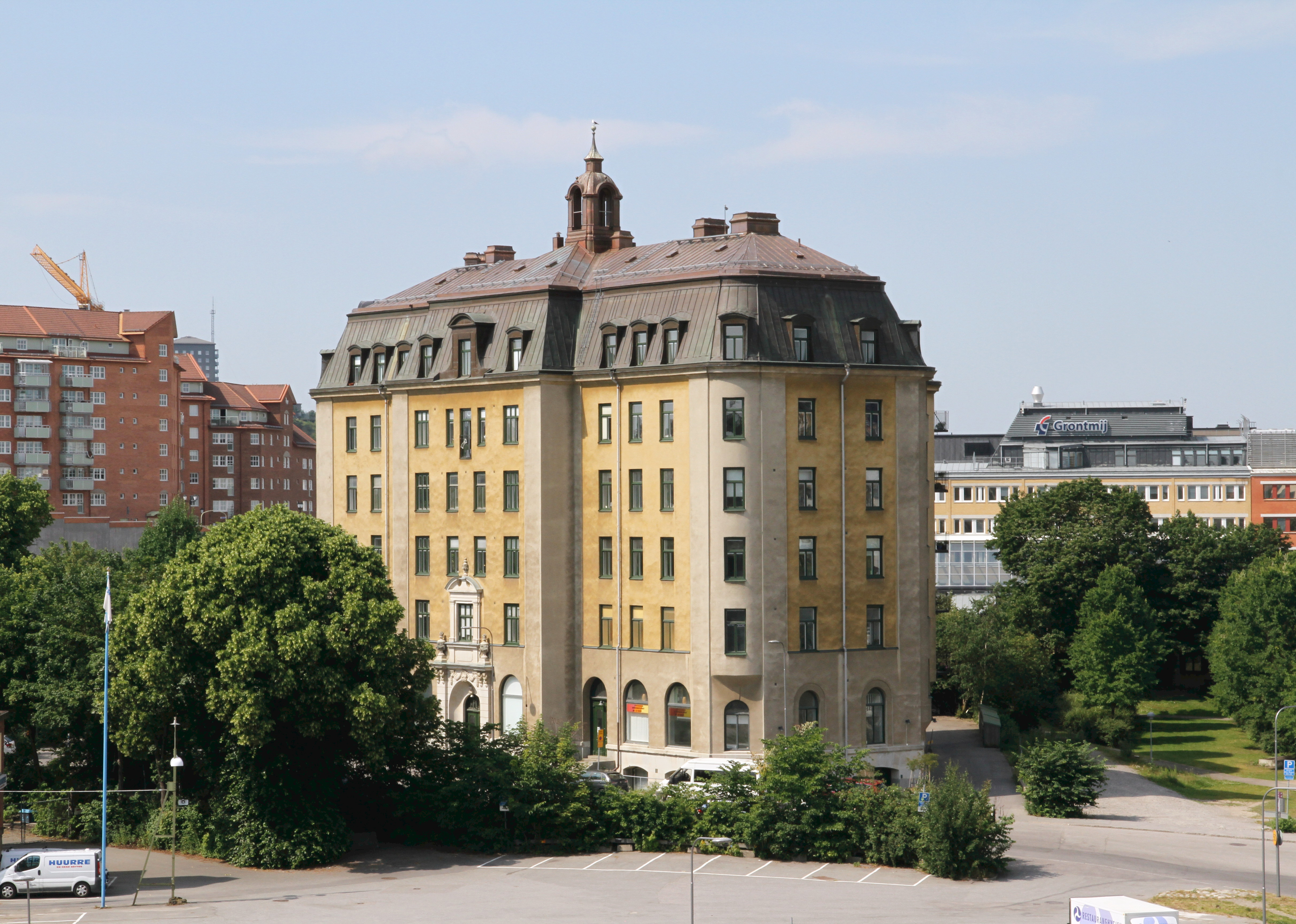 Liljeholmsvägen 8, Liljeholmen, Stockholm. Brännkyrka kommunalhus, Liljeholmens municipalsamhälle